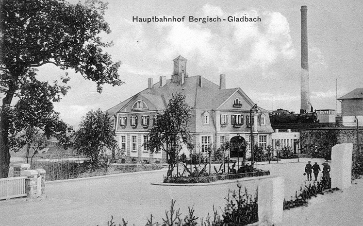 ehemaliges Bahnhofsgebäude Gronau (Bergisch Gladbach)